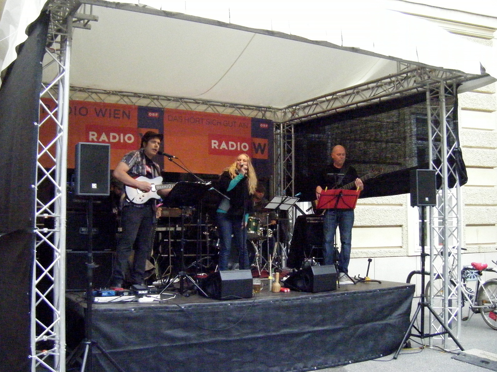 Universitätscampus Altes AKH Bierfest